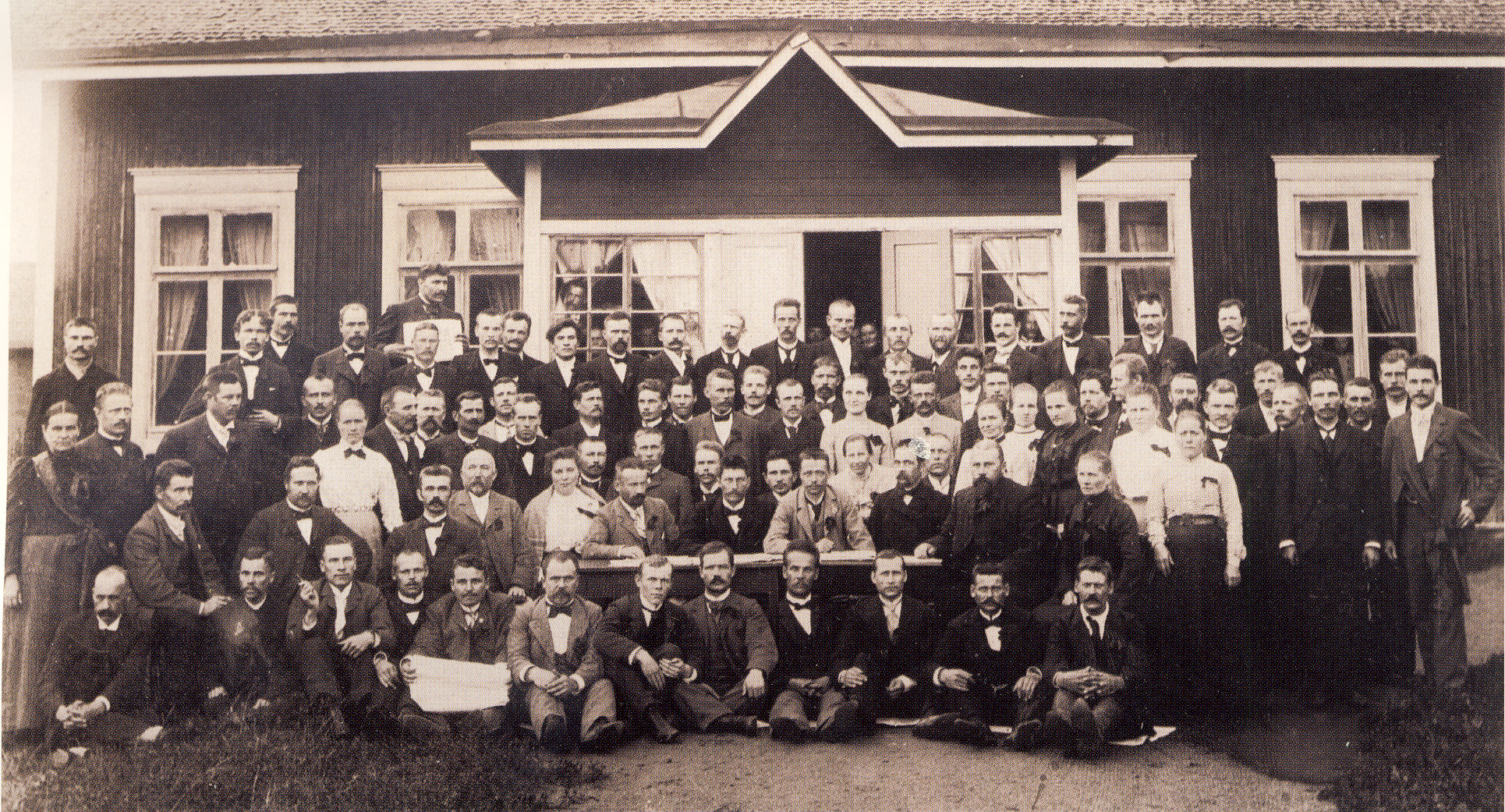 Forssan kokouksen osallistujat.